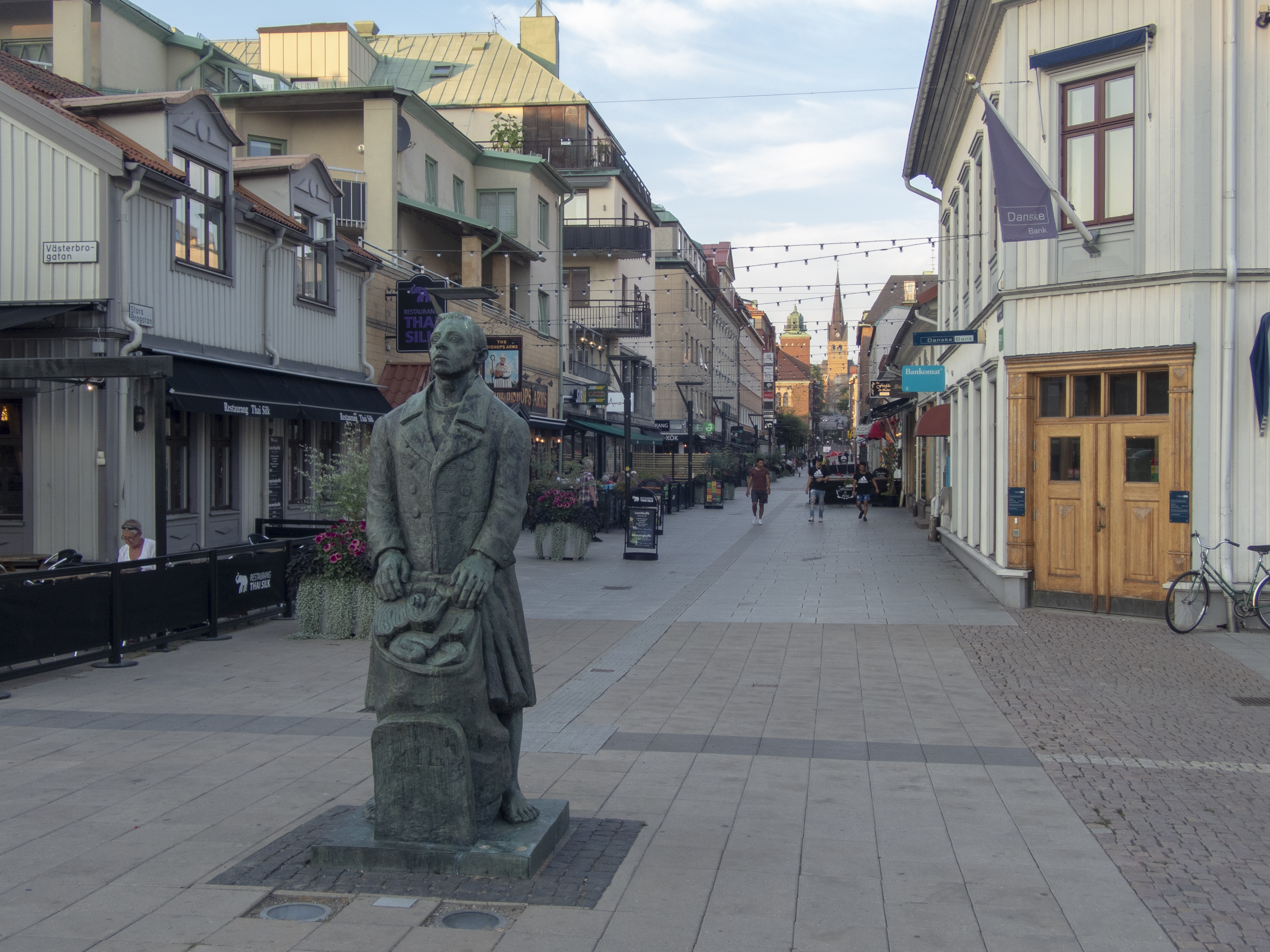 Stora Brogatan, Borås. I förgrunden Arvid Knöppels skulptur av Knallen